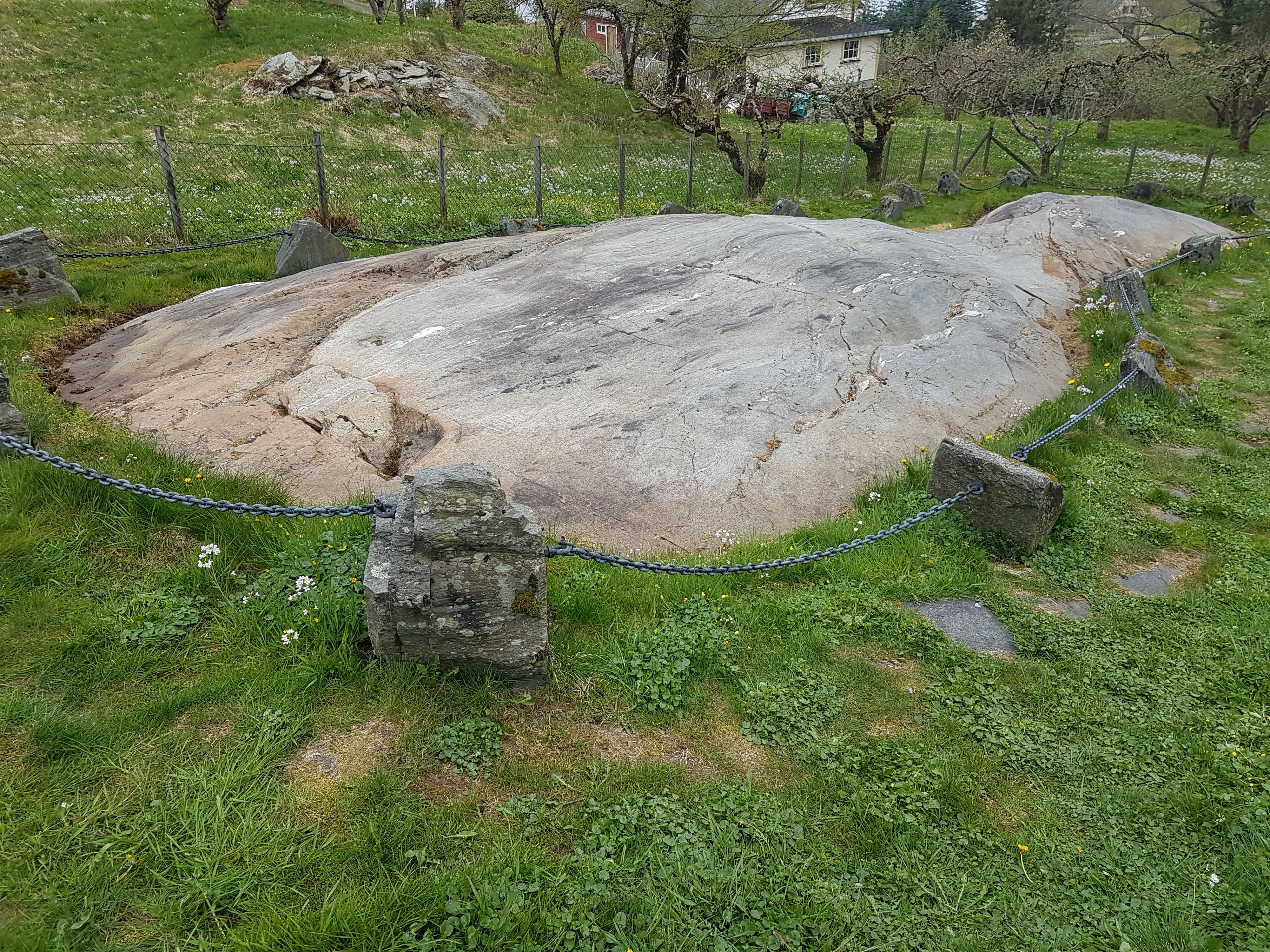 Bakke - Fetts fk. 1/1-4 (Jondal kommune). Foto: Roger Grimelid. Fra Riksantikvarens Kulturminnesøk.